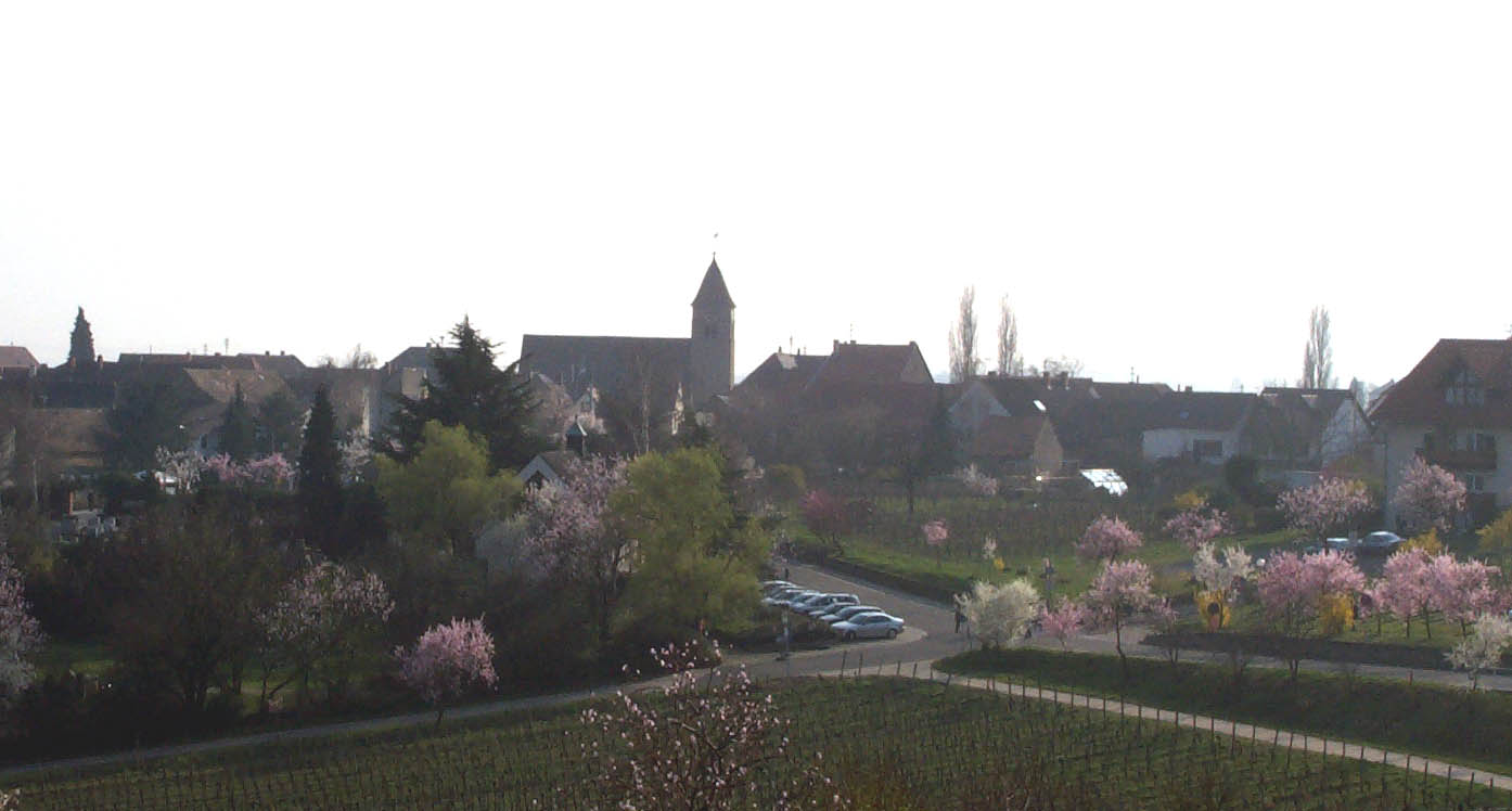 Blick auf Gimmeldingen vom Neuberg aus, selbst fotografiert und freigegeben